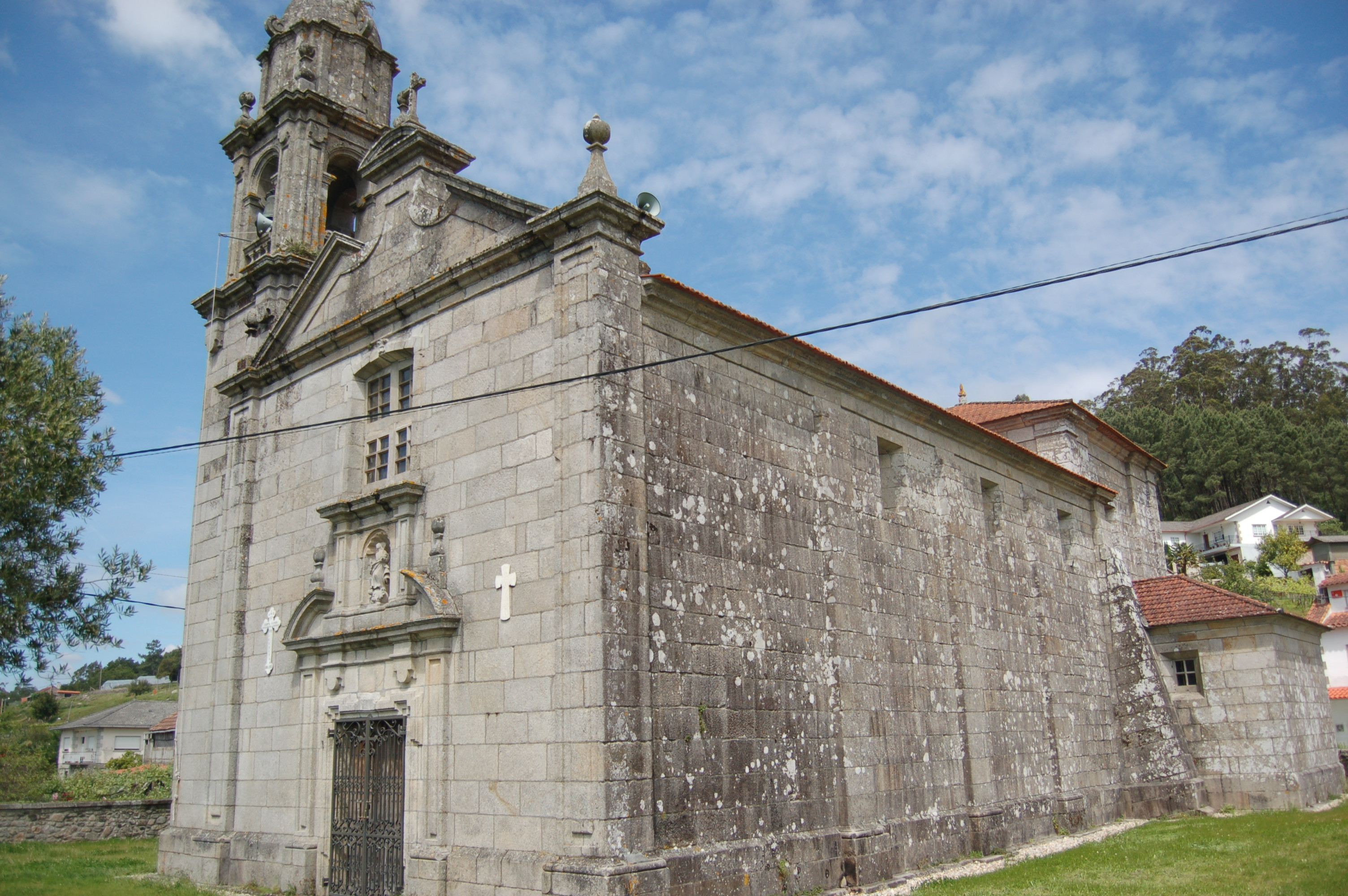 Igrexa parroquial de Santa María de Perdecanai (Barro)